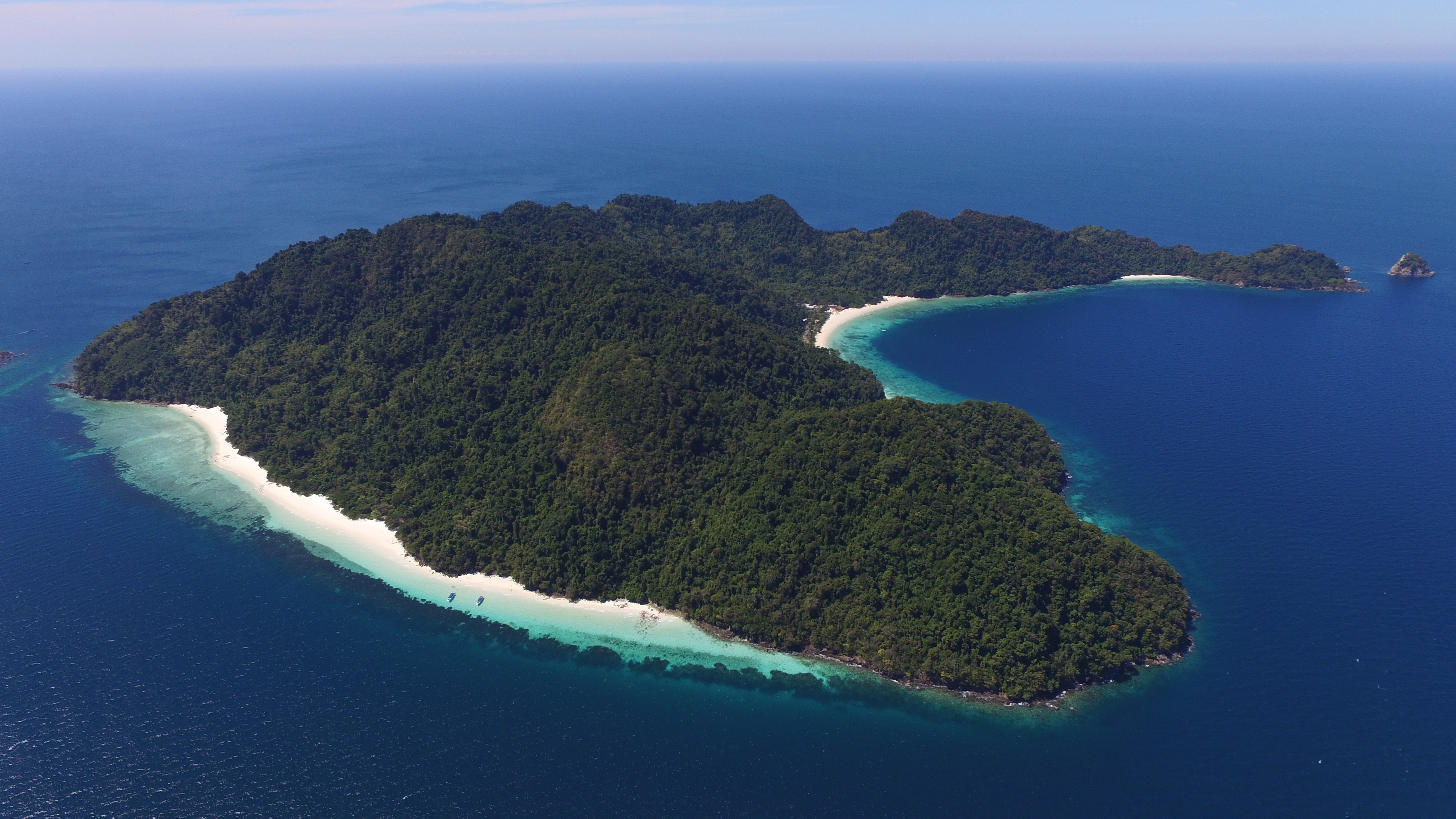 เกาะนาวโอพี